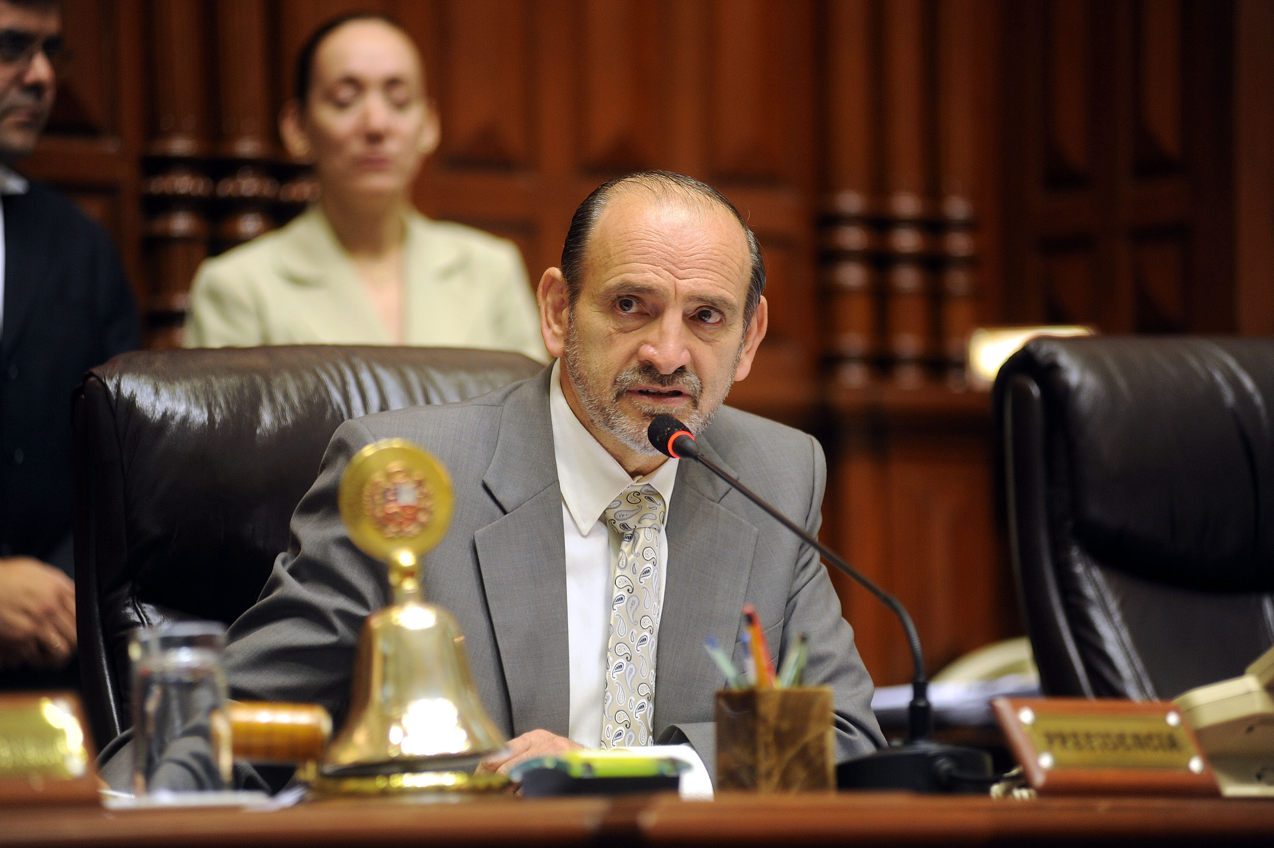 Congresista Yehude Simon Munaro, segundo vicepresidente del Congreso, dirige la sesión matutina del Pleno del Congreso.